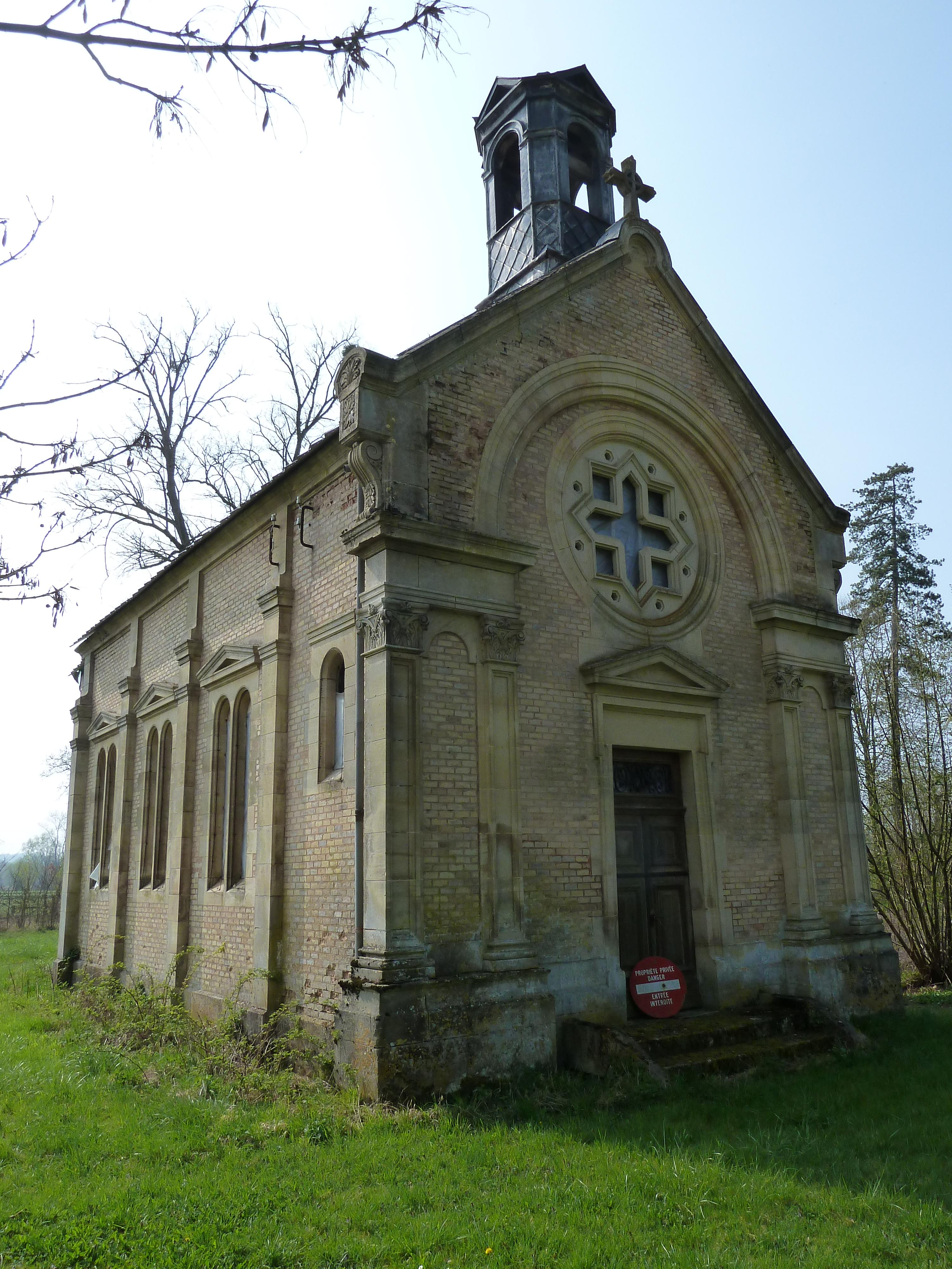 Noyers-Auzécourt 55 la Maison du Val chapelle Notre-Dame du Val. chapelle construite en 1874 qui fait partie du recensement immeubles Monuments Historiques sous la référence PA55000020. Tous les vitraux ont été volés. .